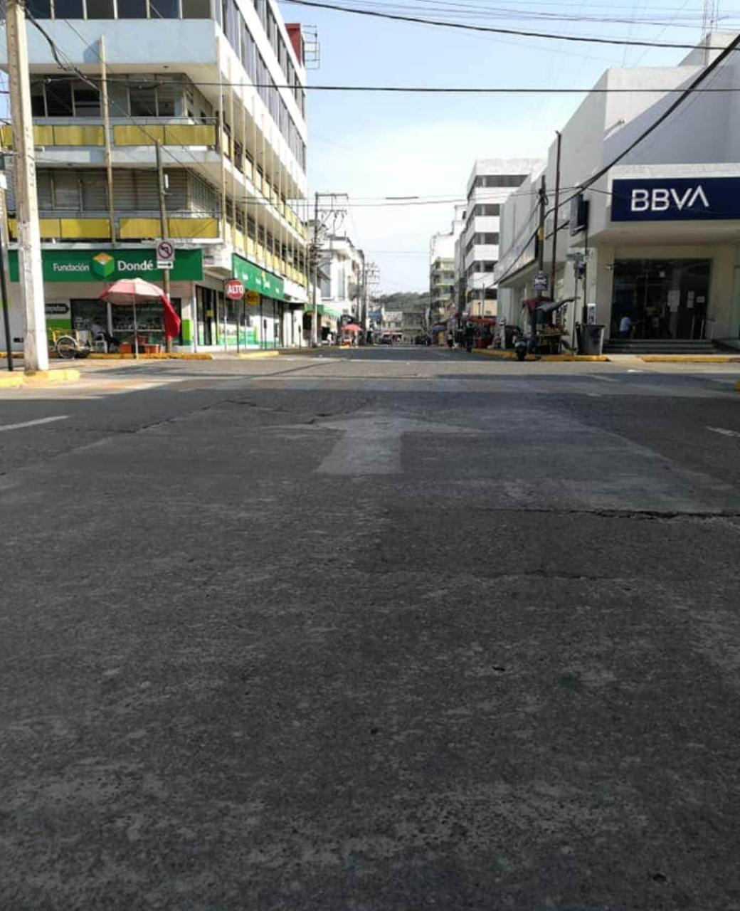 Centro de Poza Rica vació por COVID-19